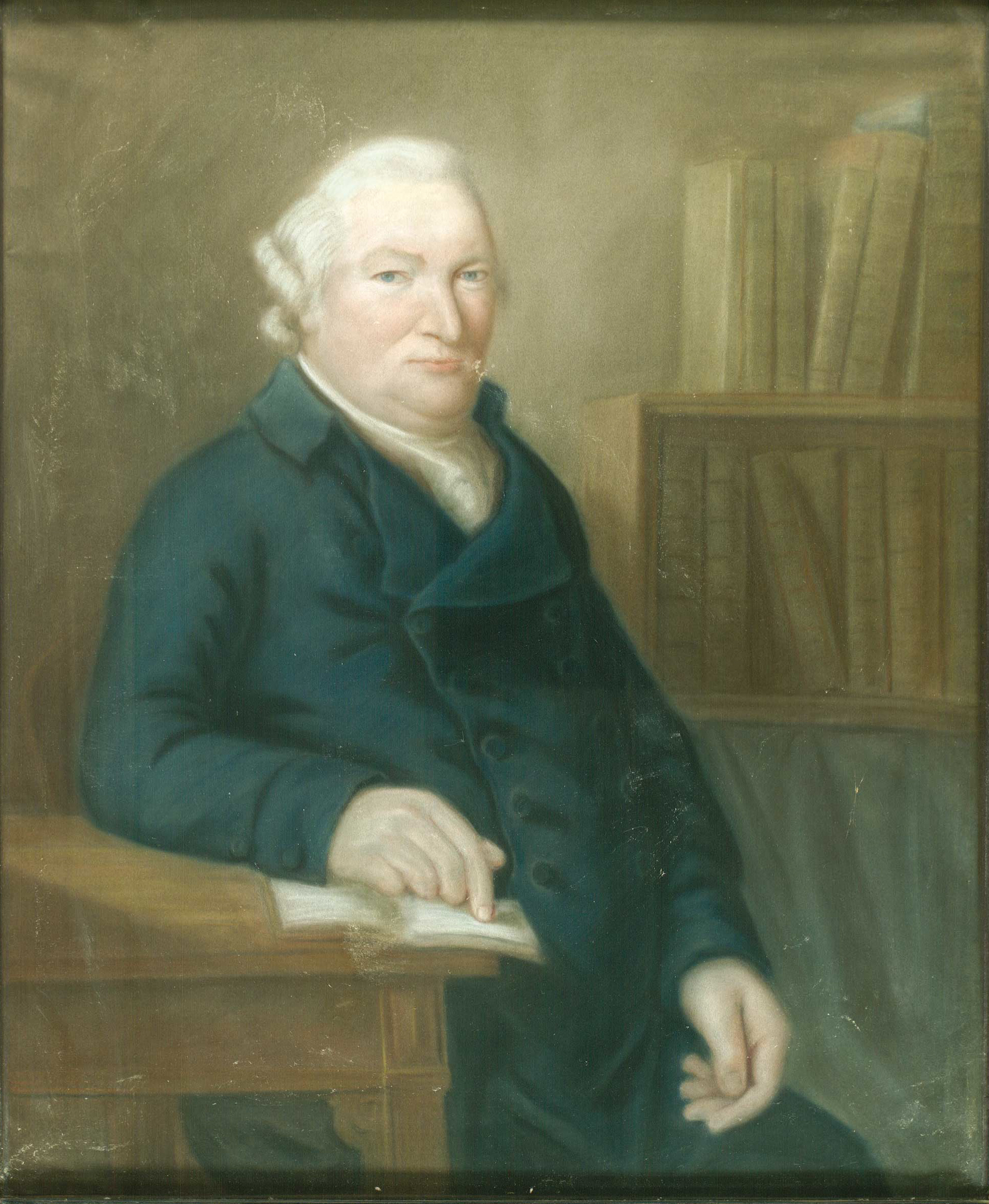 Johann Jakob Griesbach, Professor der Theologie in Jena (1745-1812)